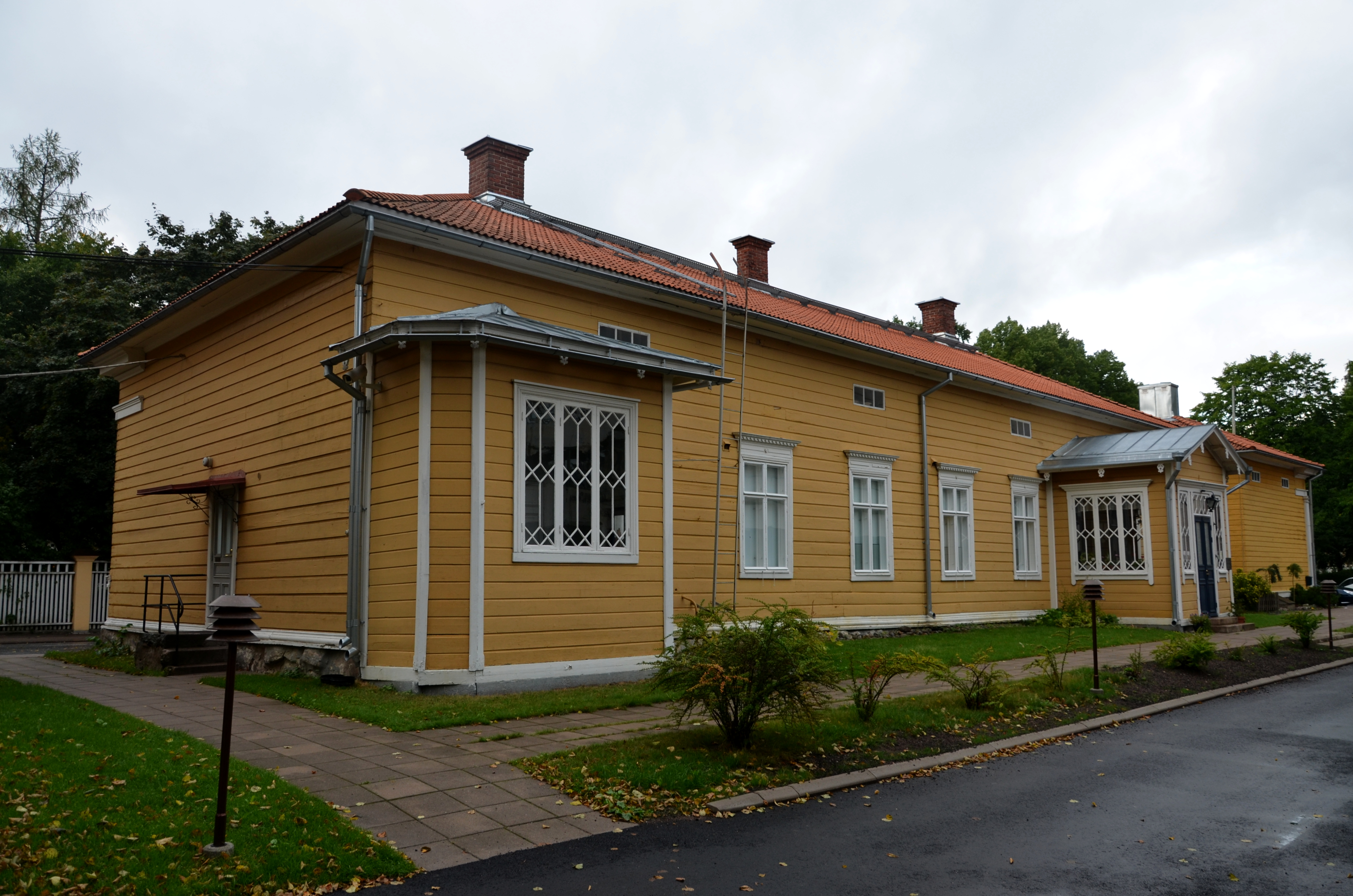 Kuva Ett Hem -museorakennuksesta ulkoapäin. Ett Hem on Turussa toimiva Åbo Akademin säätiön omistama museo.